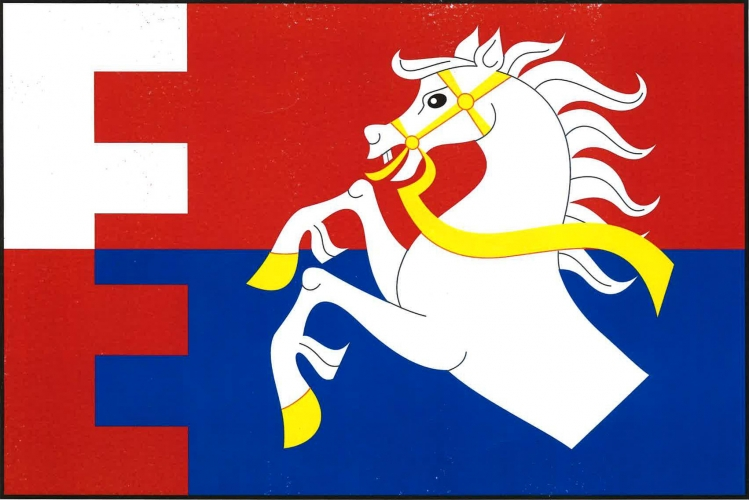 Staré Hrady, vlajka. List tvoří žerďový zubatý bílo-červeně dělený pruh se čtyřmi obdélníkovými zuby a třemi stejnými mezerami, široký čtvrtinu délky listu, a dva vodorovné pruhy, červený a modrý. Ve střední a vlající části listu polovina bílého koně ve skoku se žlutými kopyty, jazykem a uzděním. Poměr šířky k délce listu je 2 : 3.